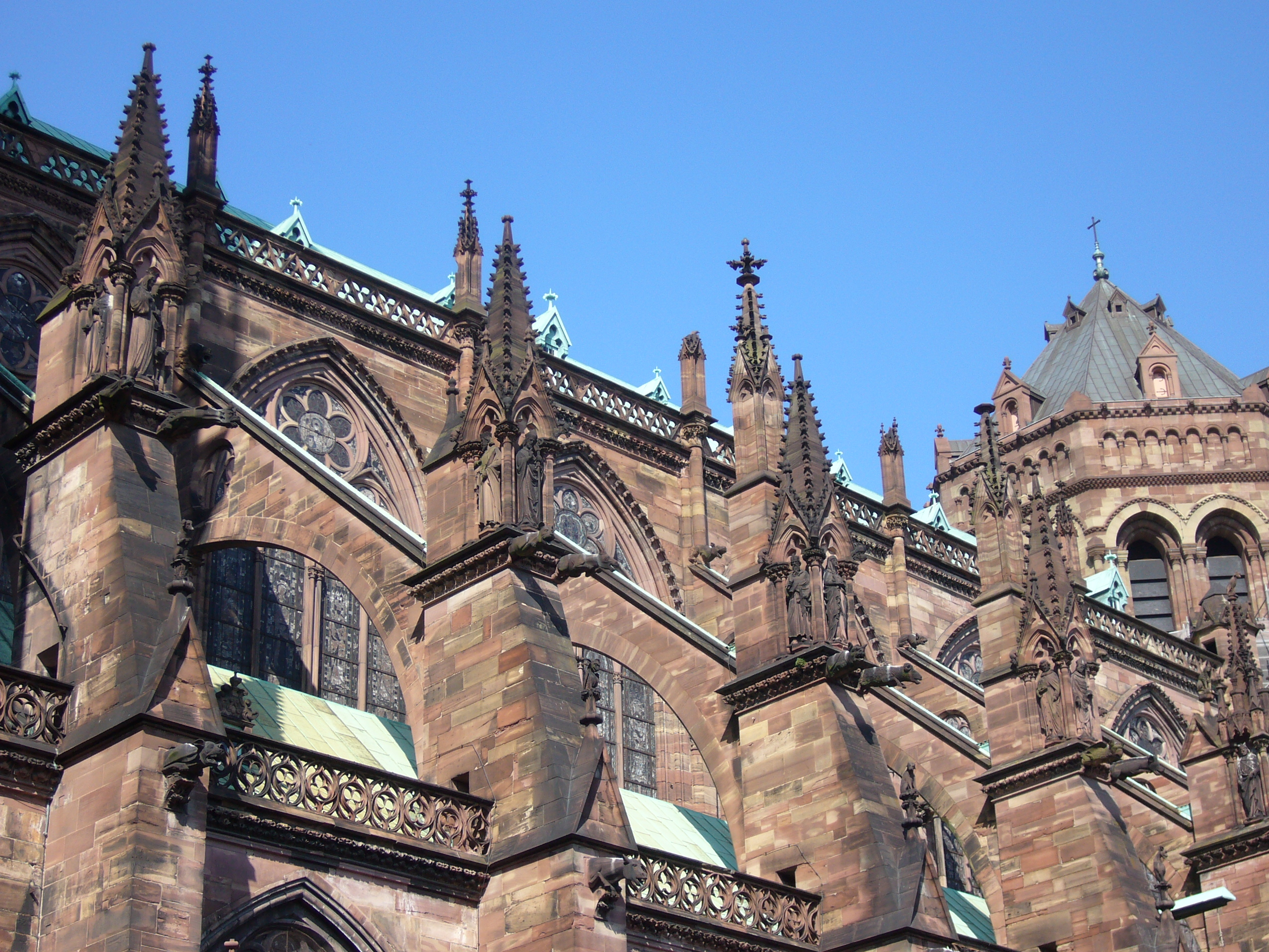 la cathédrale de Strasbourg